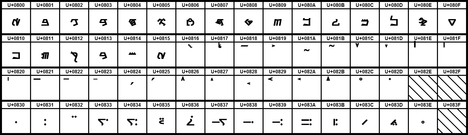 Grafiktafel für den Unicodeblock Samaritanisch. Schraffierte Felder sind unbesetzte Codepoints.